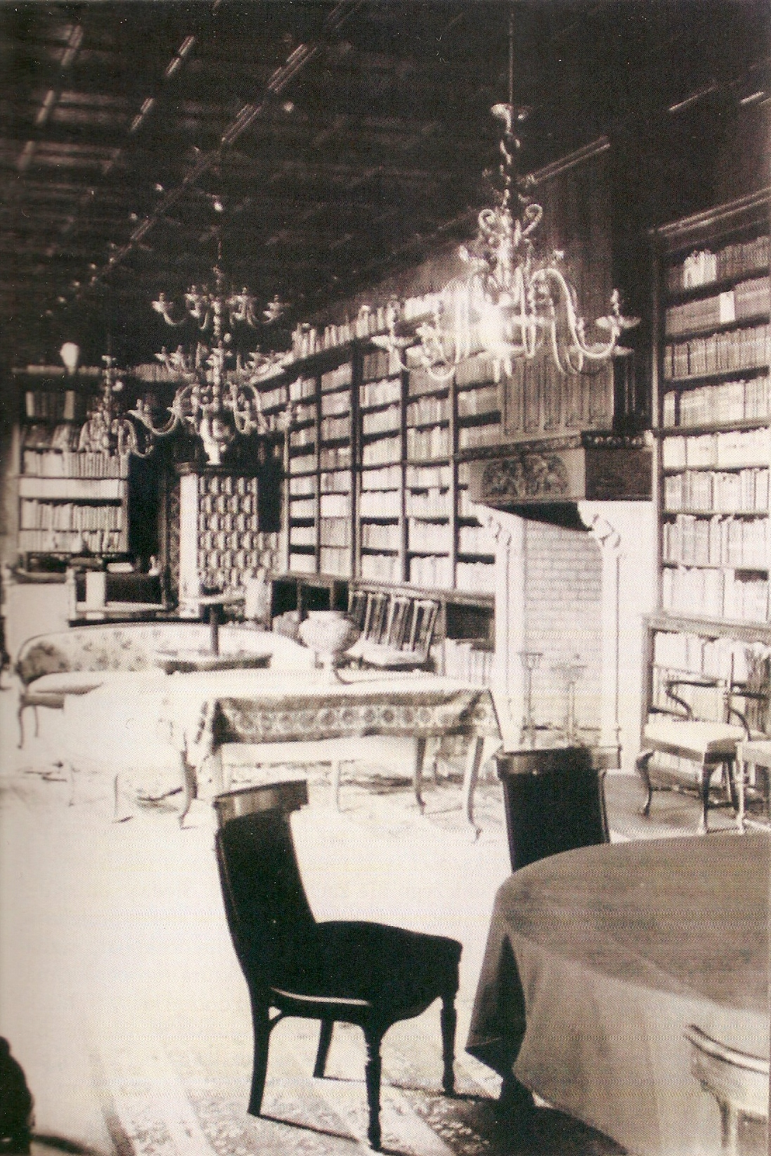 Biblioteka w pałacu Radolińskich w Jarocinie, rok 1909.